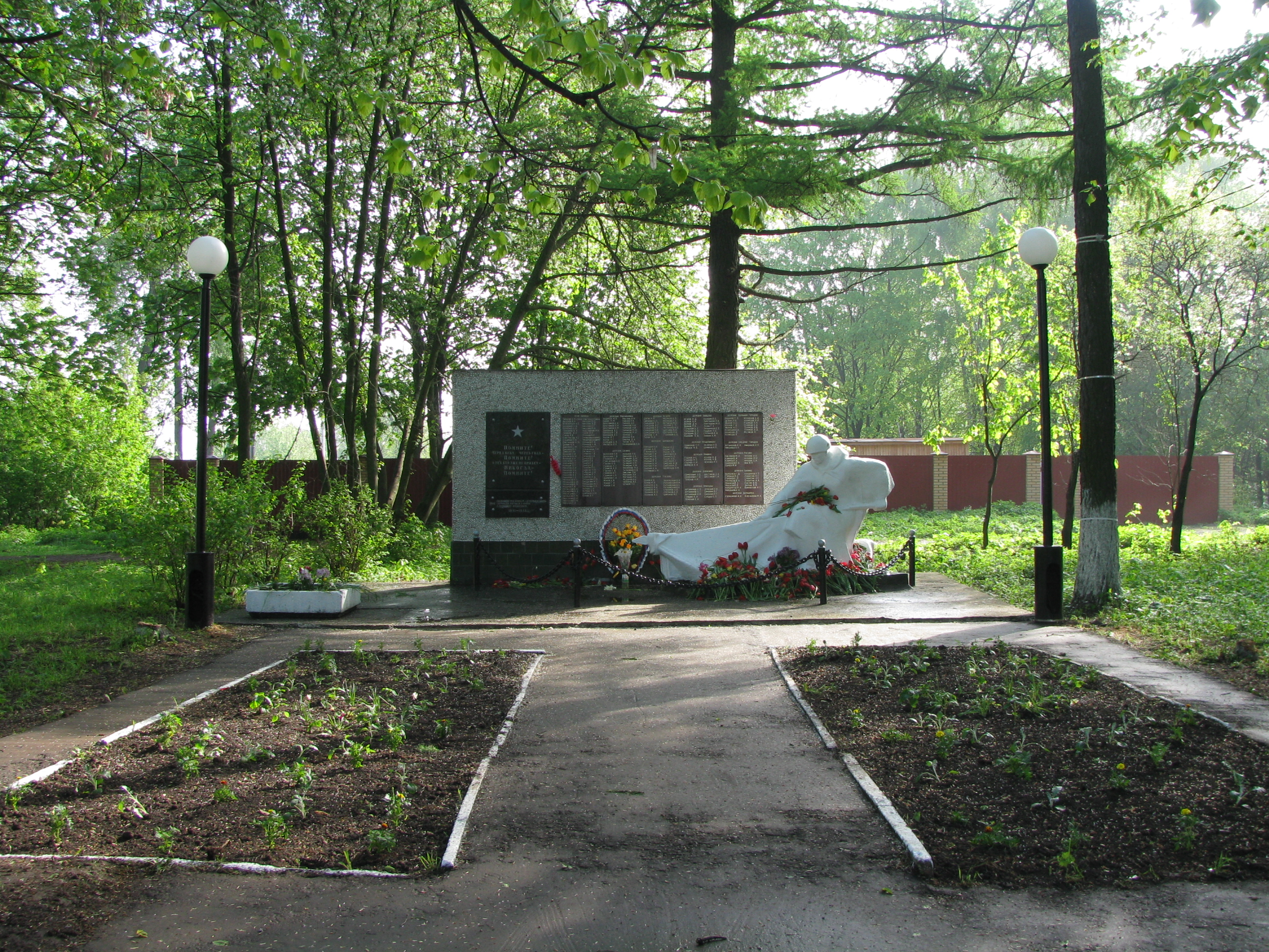 Lipitsy village, Monument_for_Fallen_in_WWII (Serpukhov District, Moscow Region)/ Липицы, Памятник землякам, погибшим в ходе Великой Отечественной войны (Серпуховский район Московской области)